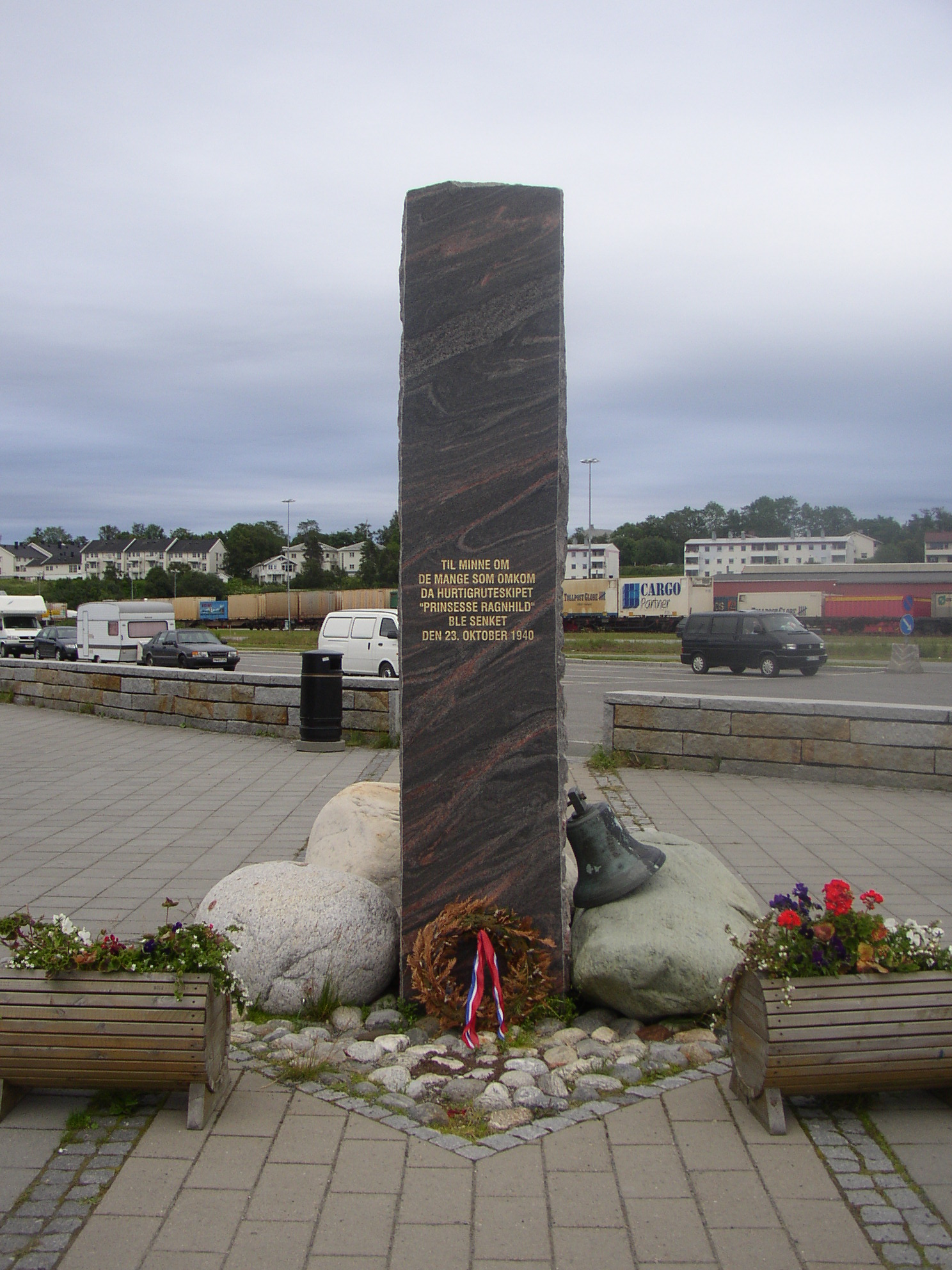 Monument commémorant le naufrage du Prisesse Ragnhild le 23 octobre 1940. Photo prise le 22/07/06. Photo personnelle.